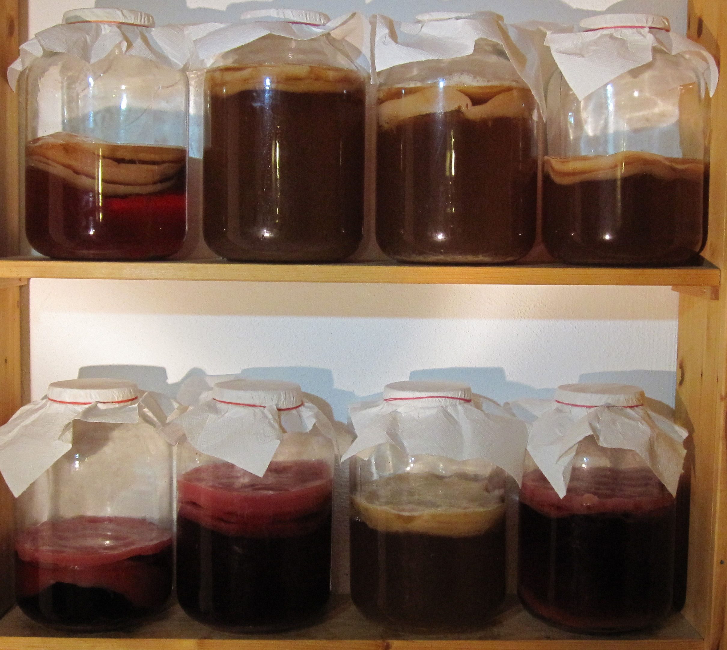 Kombucha In Gärgläsern von Original-Kombucha.de